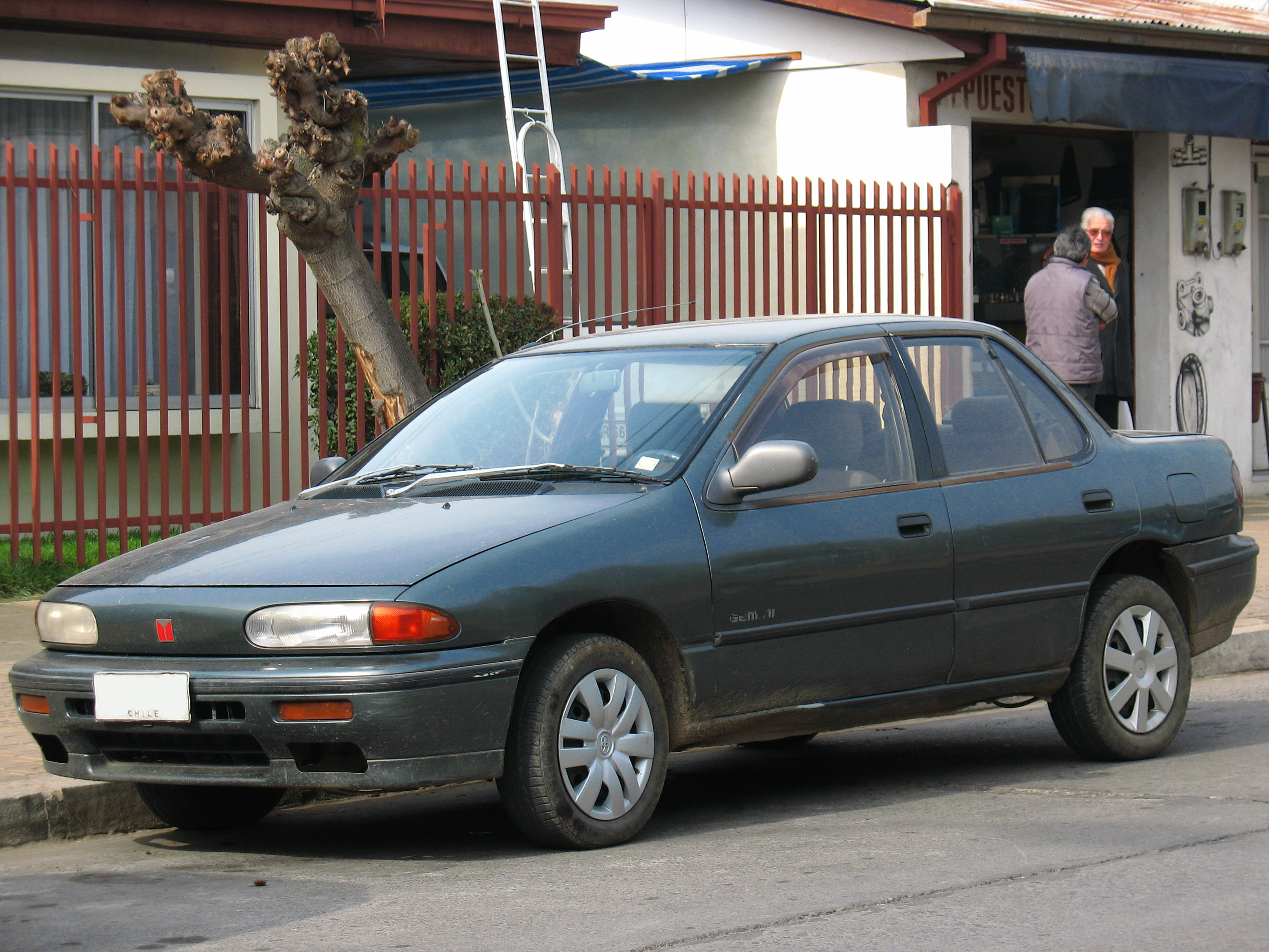 Isuzu Gemini 1.7 CC Diesel 1992